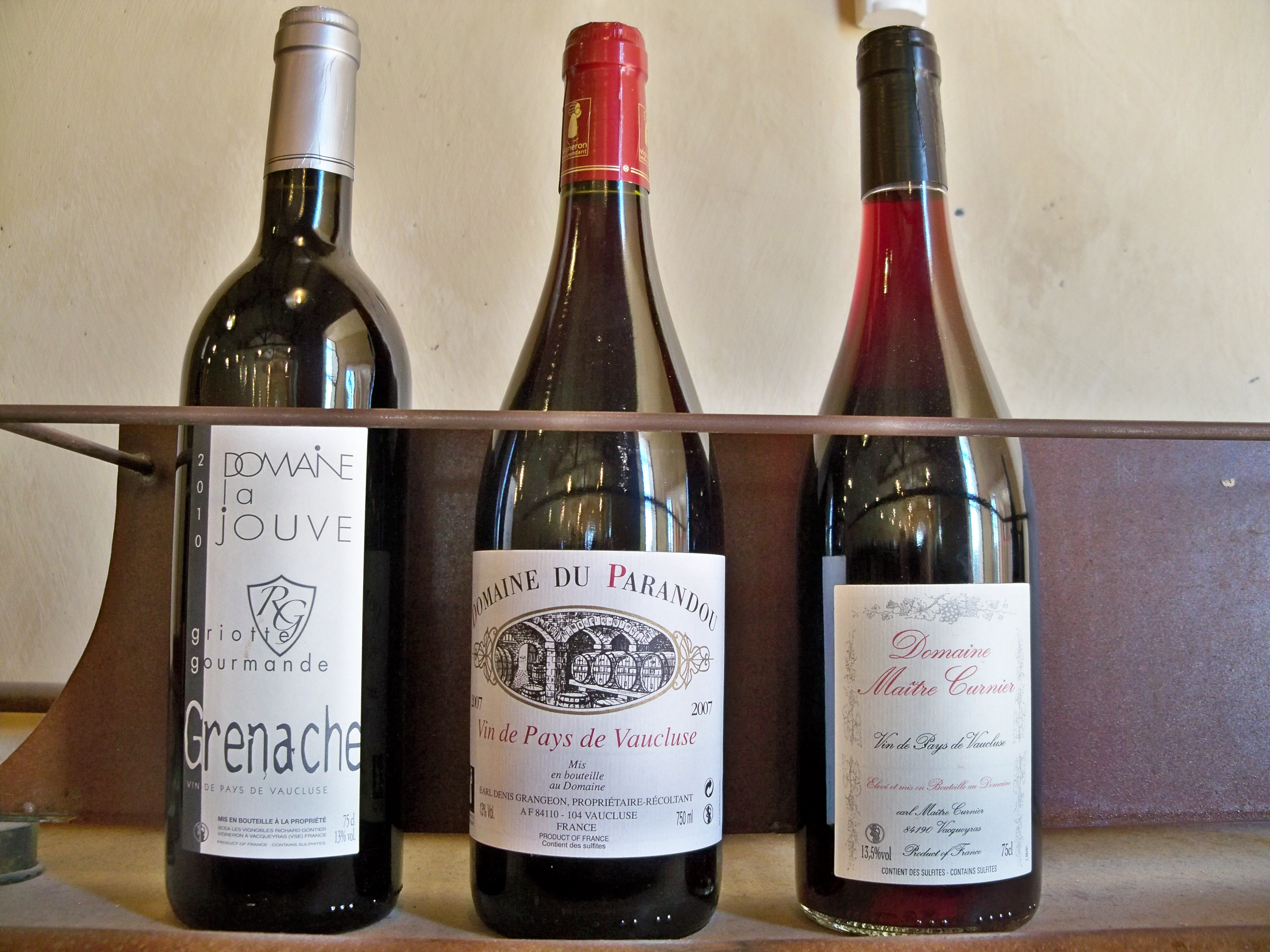 Vin de Pays de Vaucluse